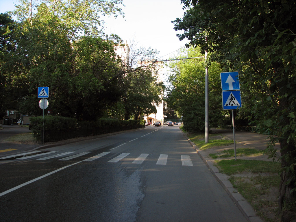 Москва, конец Малой Пироговской улицы.